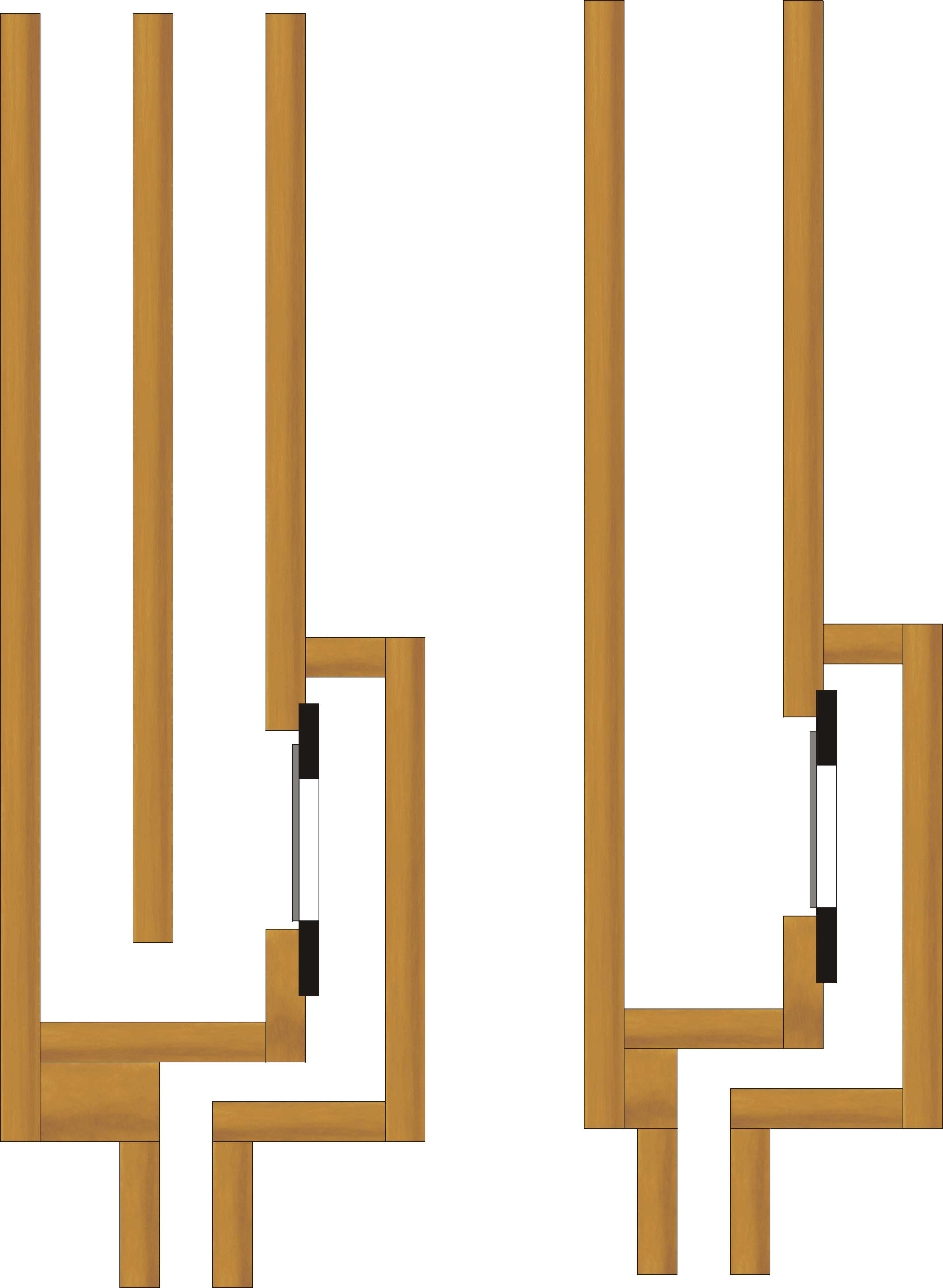 schematische Darstellung der gewendeten Durchschlagzunge beidseitig/einseitig offen